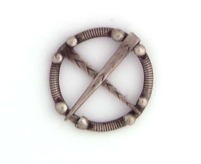 Skjortering eller krosstornring støpt i sølv fra Uvdal i Buskerud. Foto Anne Lise Reinsfelt / Norsk Folkemuseum, NF.1979-021.